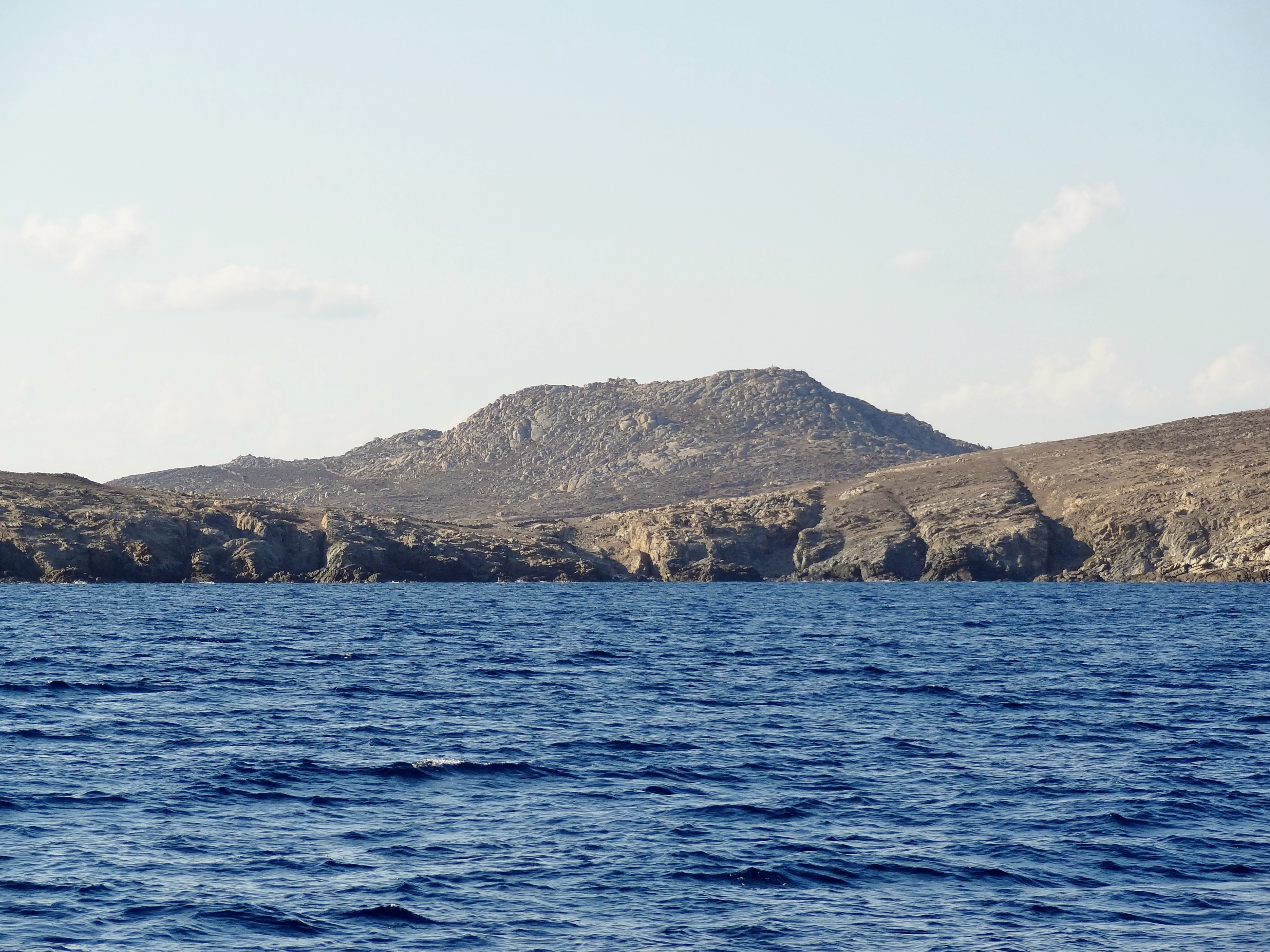 Nordküste von Delos, Kykladen, Griechenland